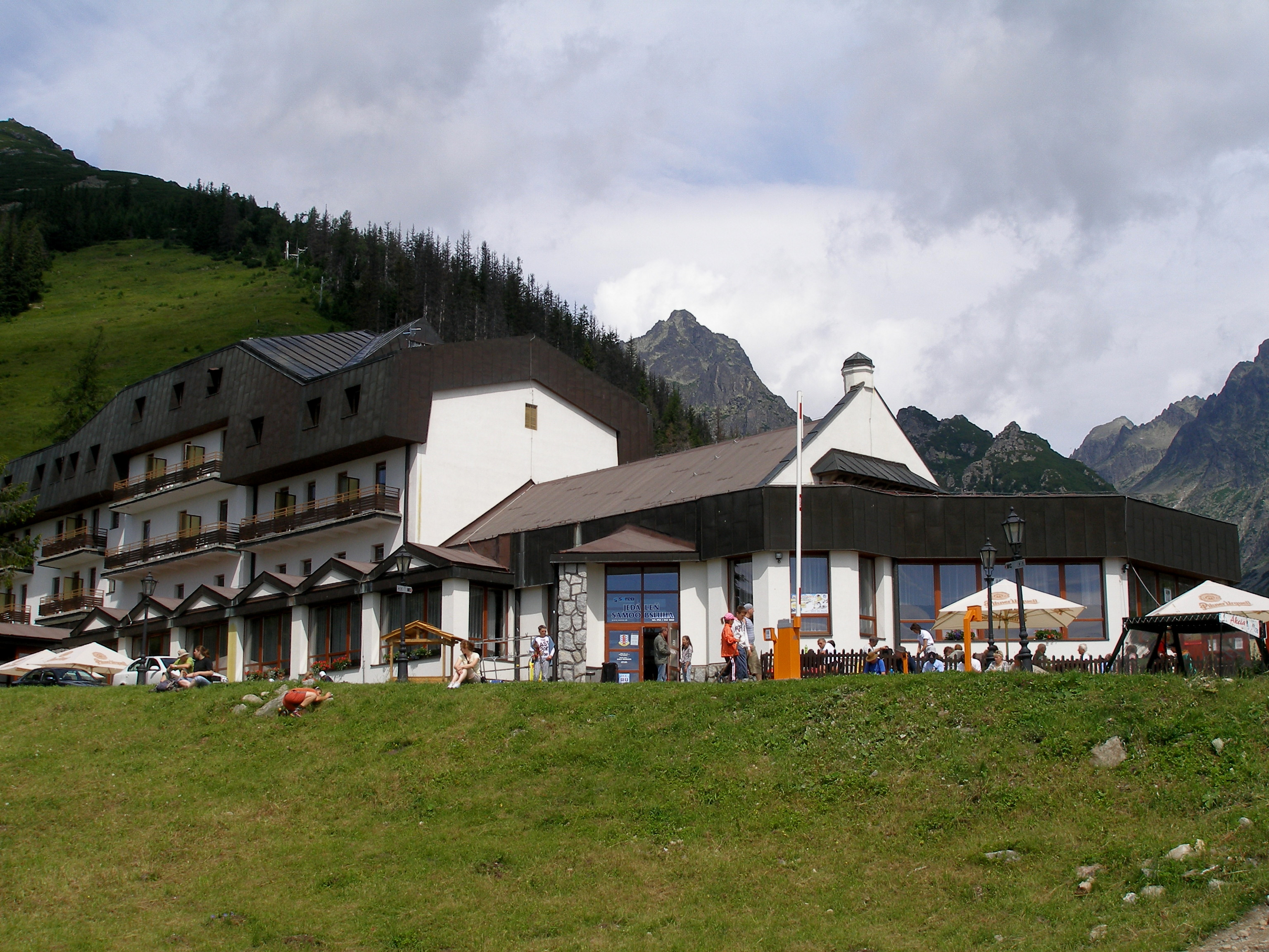 Horský komplex na Hrebienku. Vysoké Tatry.